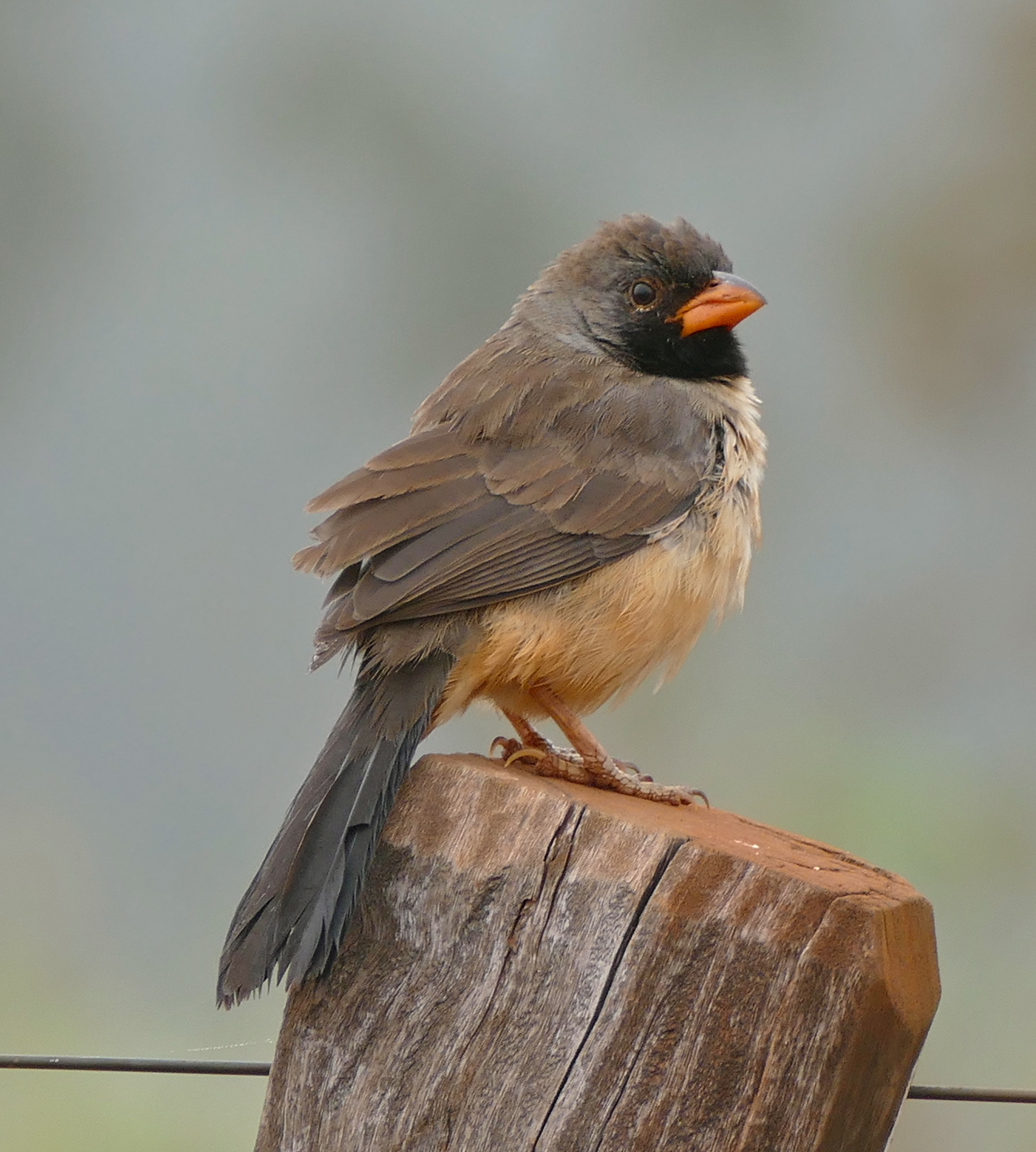 Transpantaneira, Poconé, Mato Grosso, BRAZIL